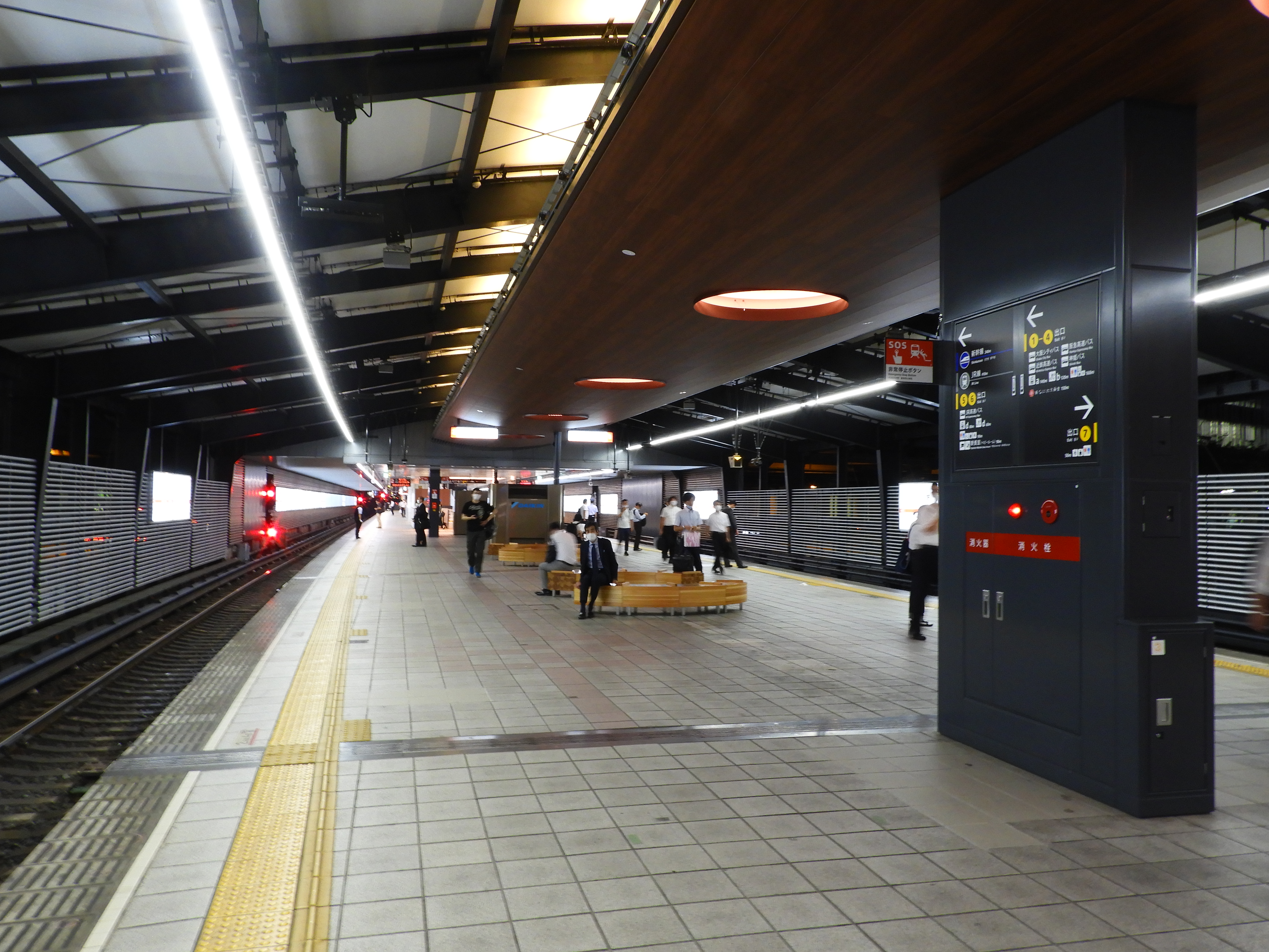 Osaka Metro御堂筋線新大阪駅リニューアル後のホーム(なかもず側) Nikon Coolpix B700